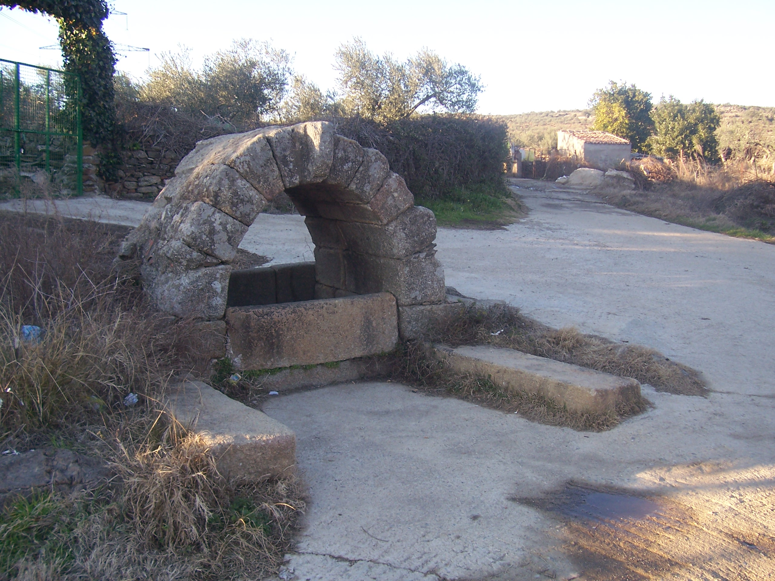 Fuente Romana del Ronco, a las afueras de Montehermoso, Cáceres, España